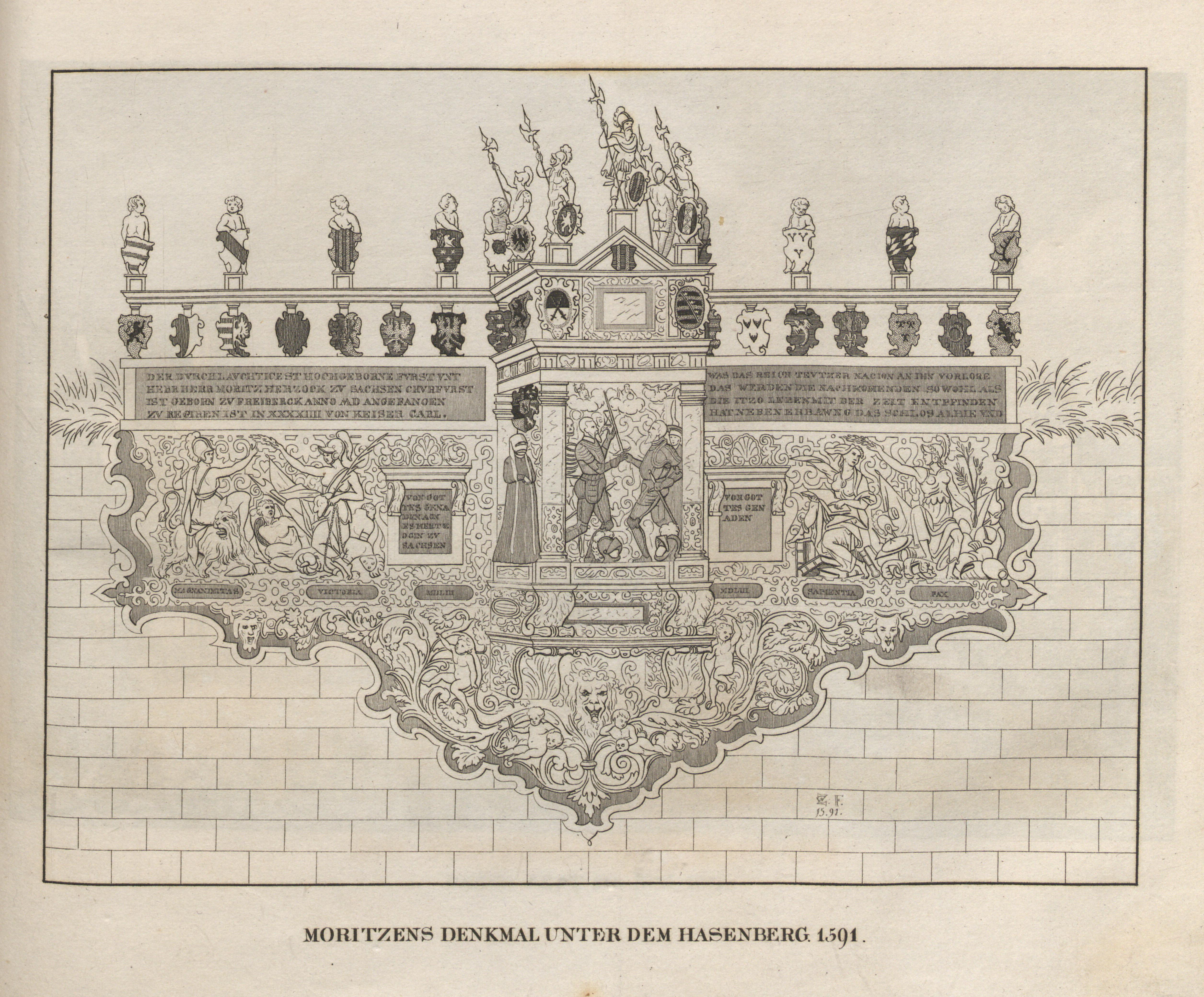 siehe Bildbeschreibung aus: Abbildungen von Dresdens alten und neuen Pracht-Gebäuden, Volks- und Hof-Festen. Untertitel: Kupferheft zur Chronik der Kgl. Sächs. Residenz-Stadt Dresden und des Sammlers für Geschichte und Alterthum, Kunst und Natur im Elbthale. Grimmer, Dresden 1835